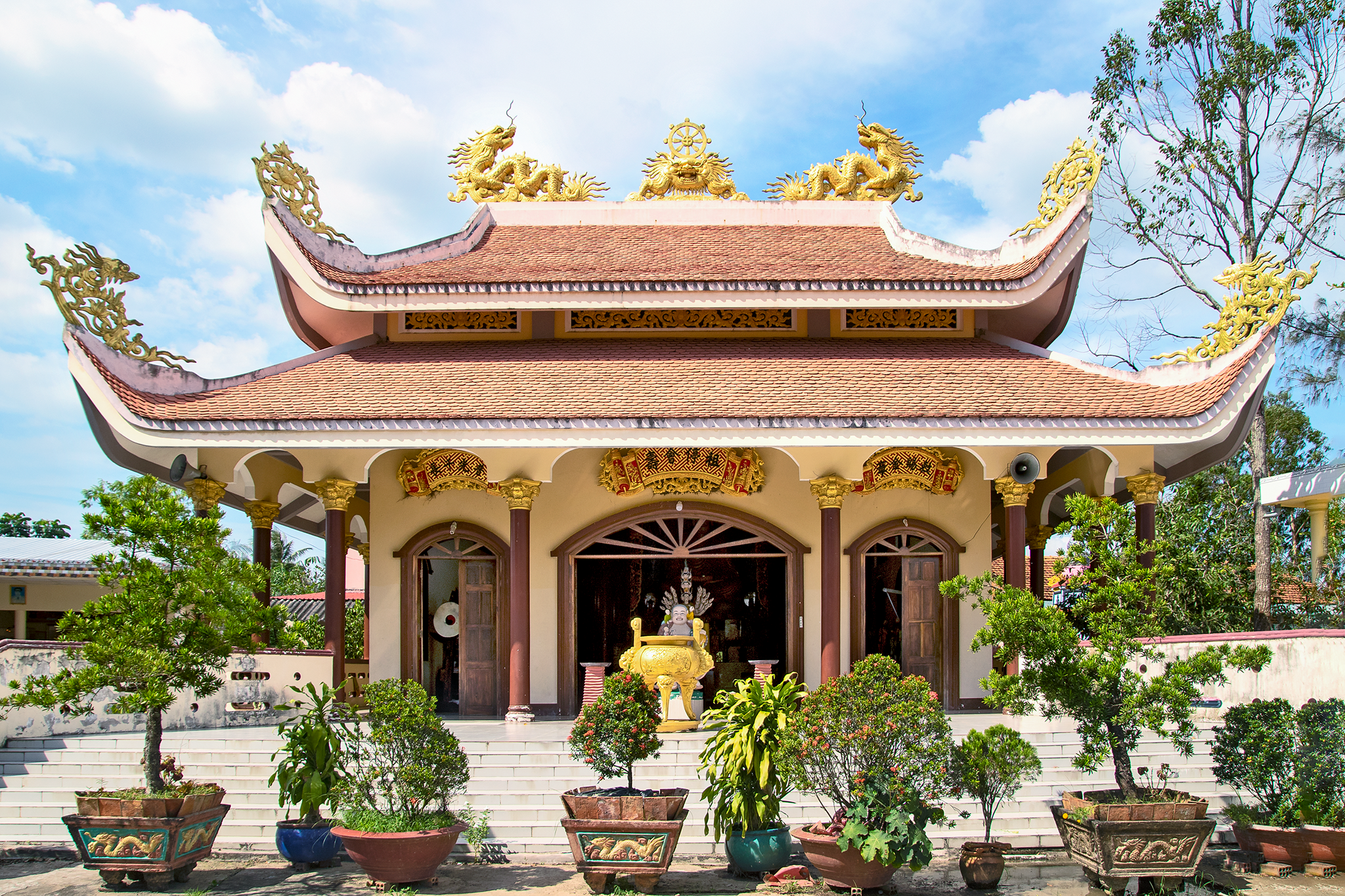 Chùa Hội Thọ ở Cái Bè, Tiền Giang, Việt Nam.